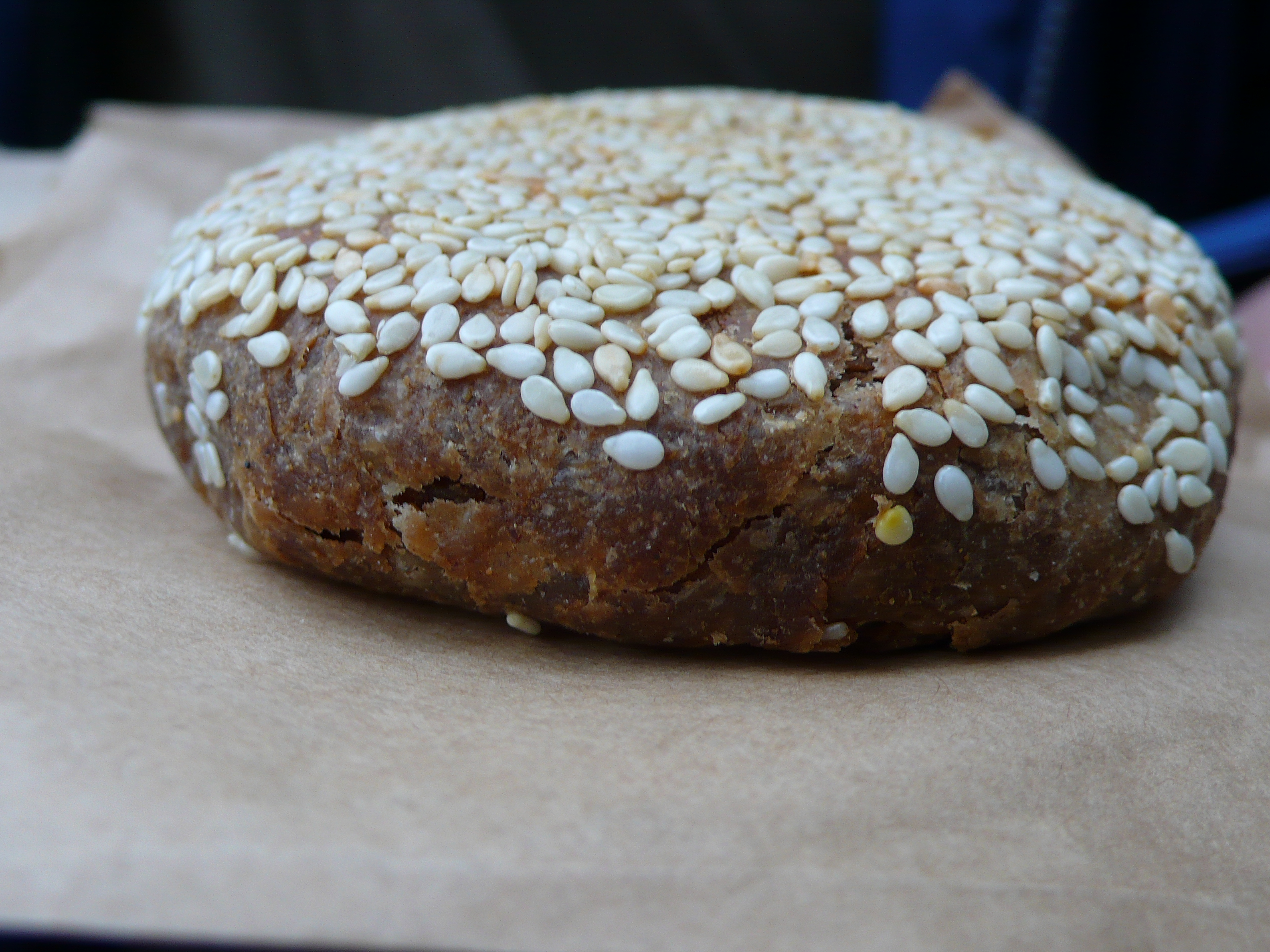 Shaobing pastry